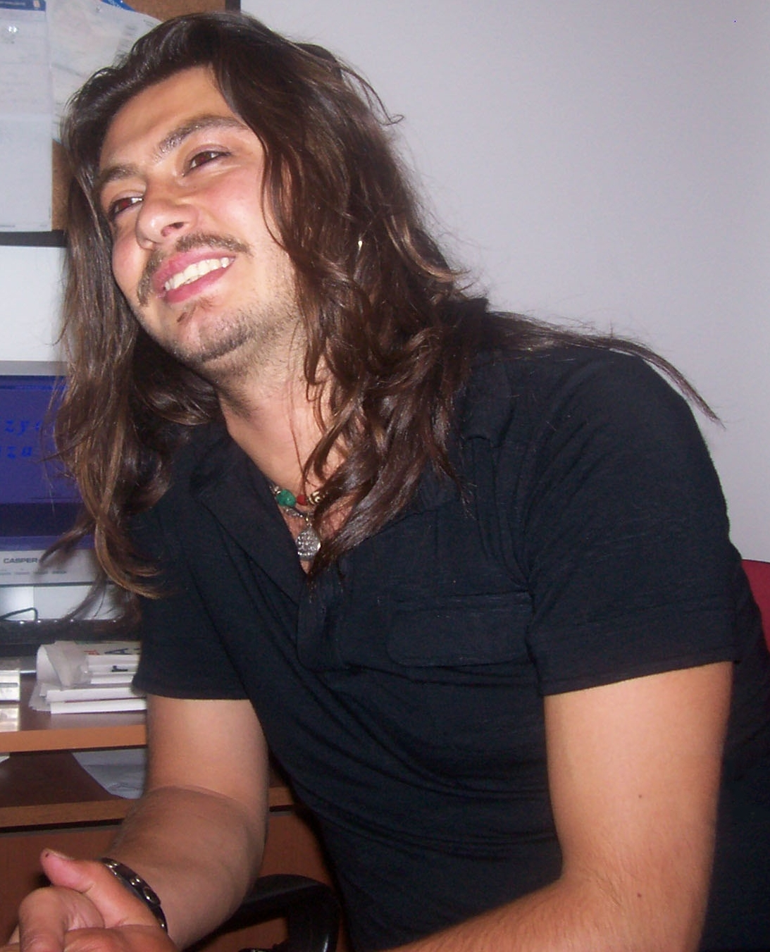 Barış Akarsu, Turkish musician